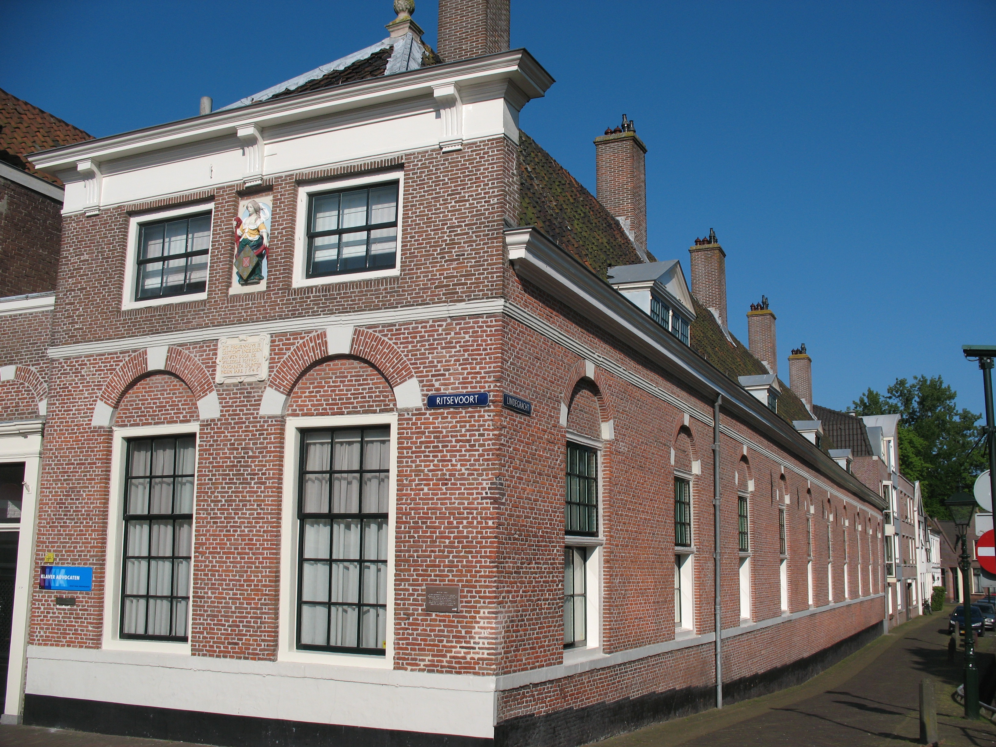 Alkmaar - hofje van Splinter Ritsevoort